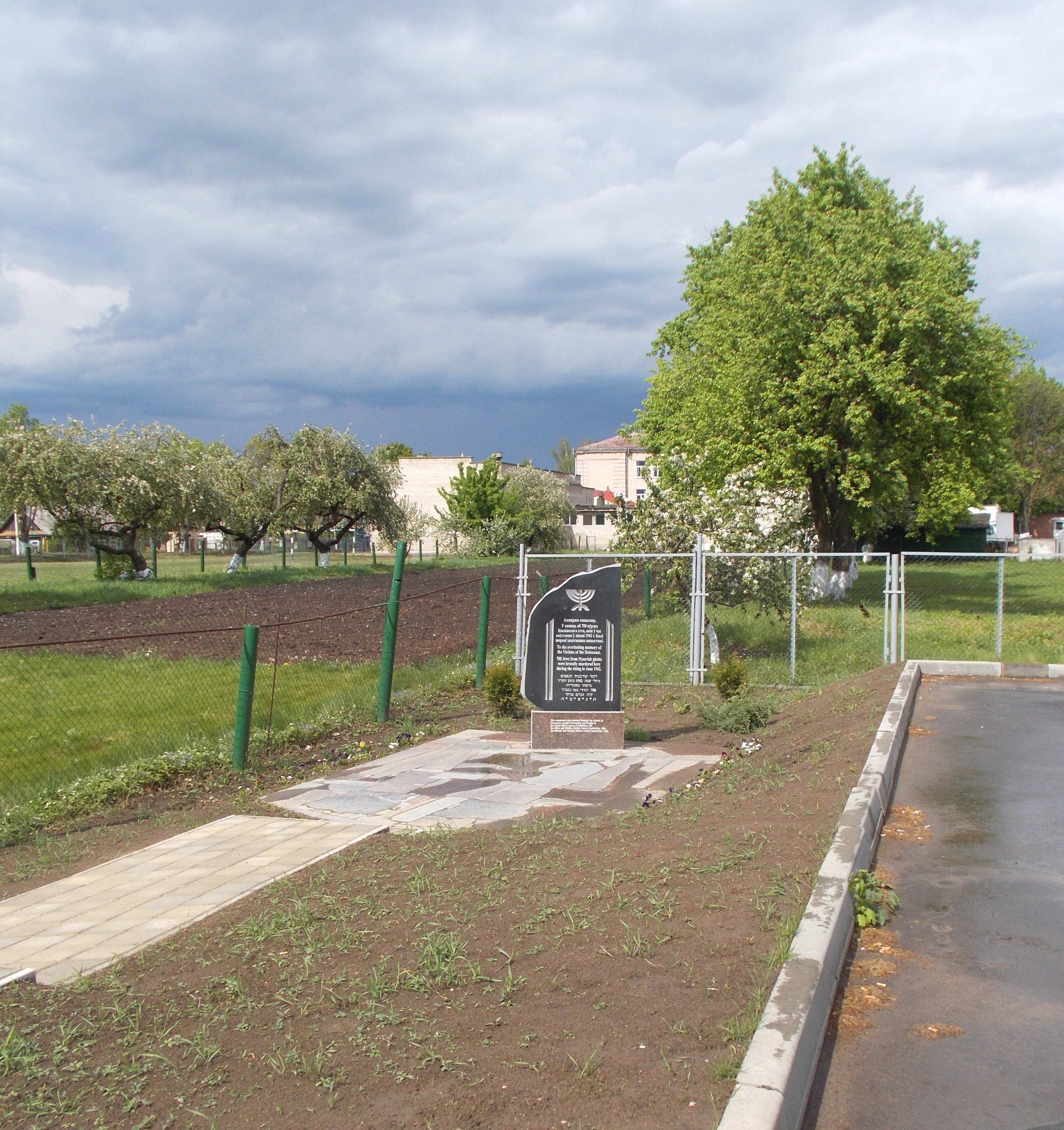 Памятник погибшим евреям при восстании в Несвижском гетто в июле 1942 года. Находится на улице 1-го Мая, напротив дома № 27.